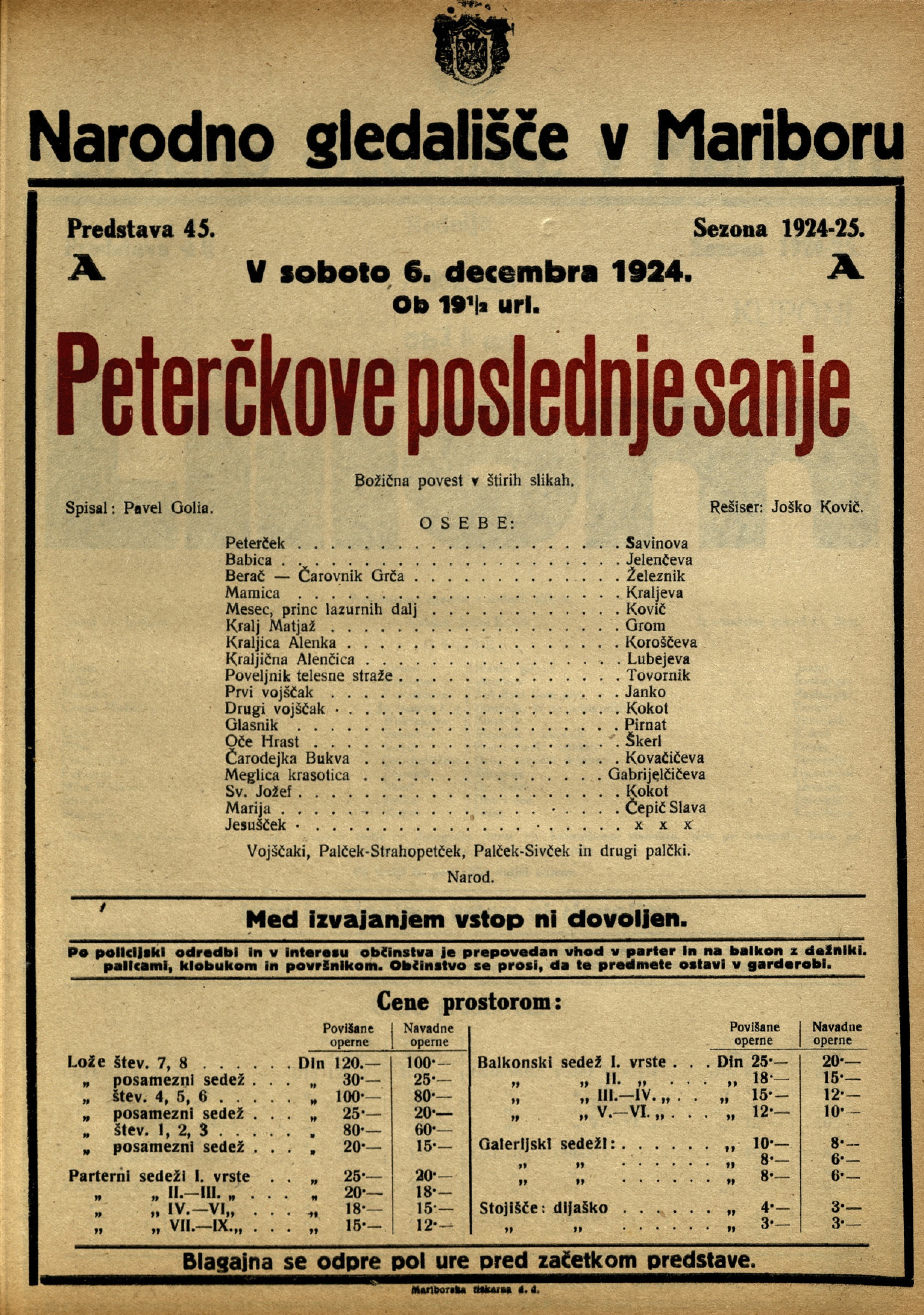 Plakat za predstavo Peterčkove poslednje sanje v Narodnem gledališču v Mariboru.